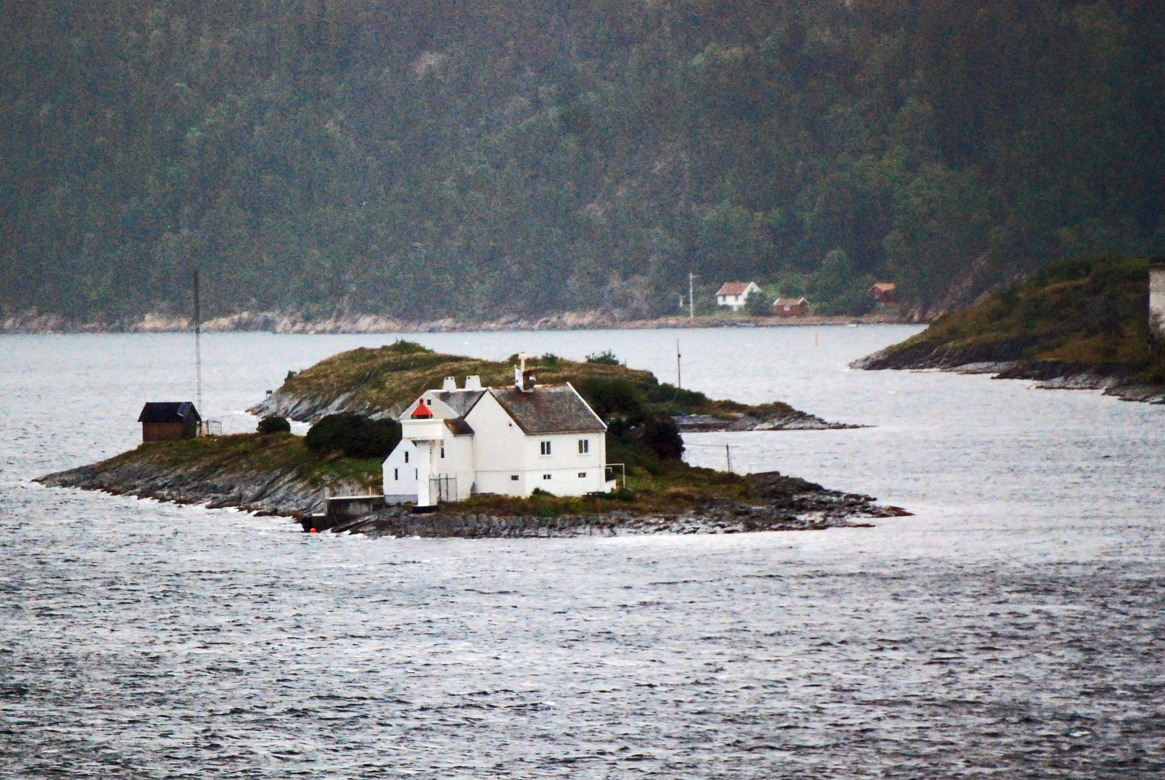 Steilene lighthouse in Oslofjorden